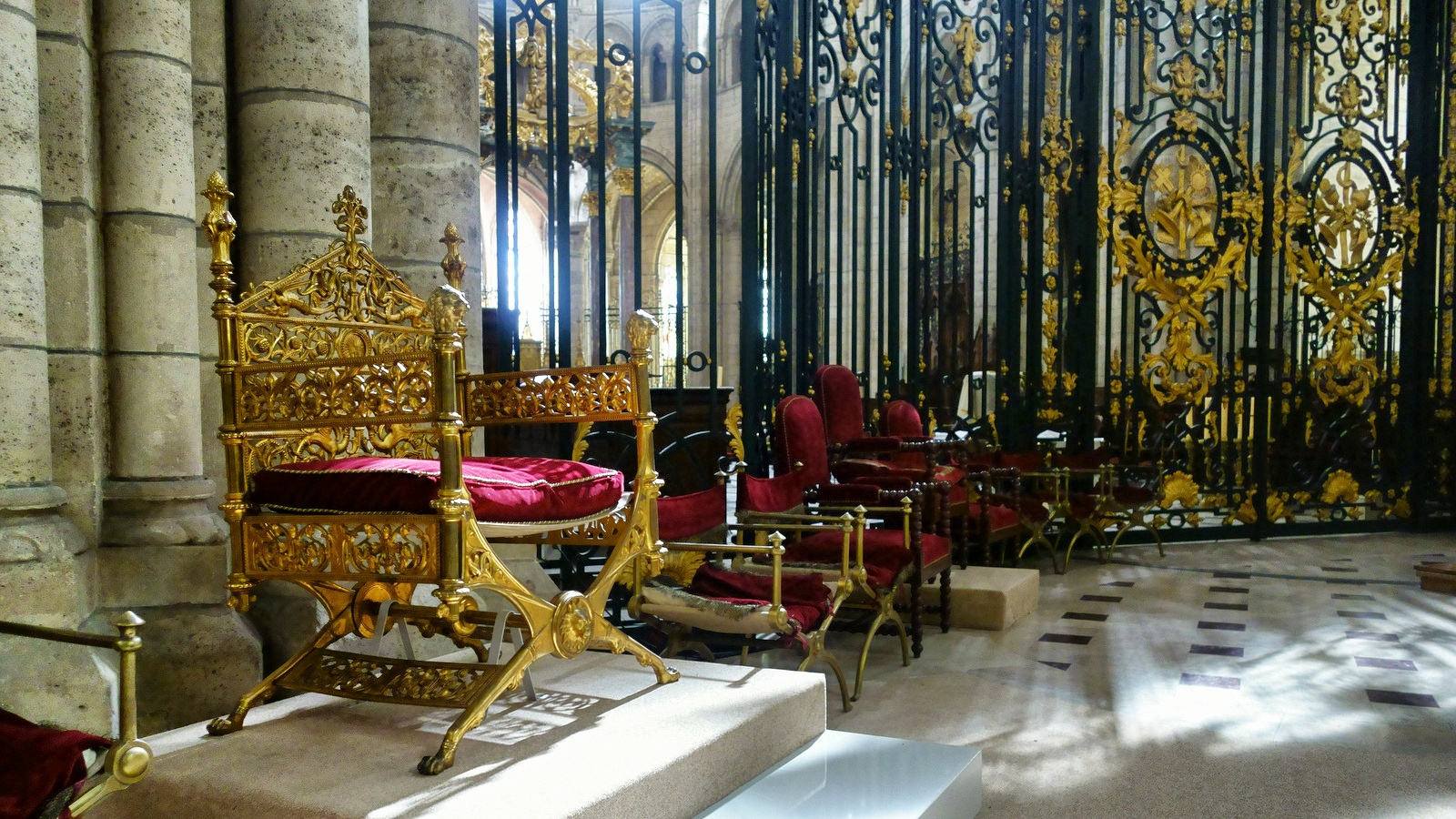 Cathédrale Saint-Étienne de Sens